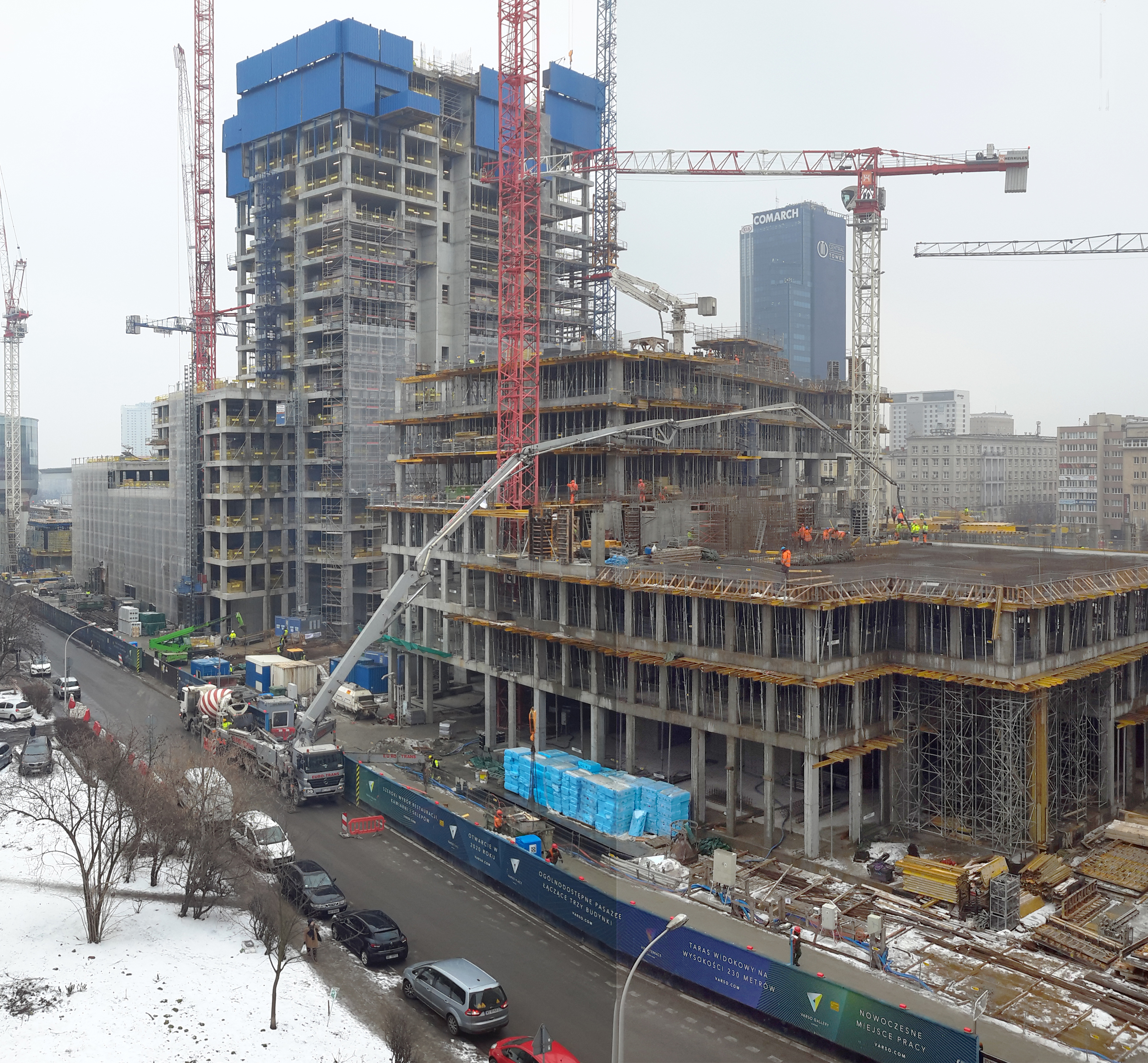 Plac budowy Varso w dniu 1 lutego 2019